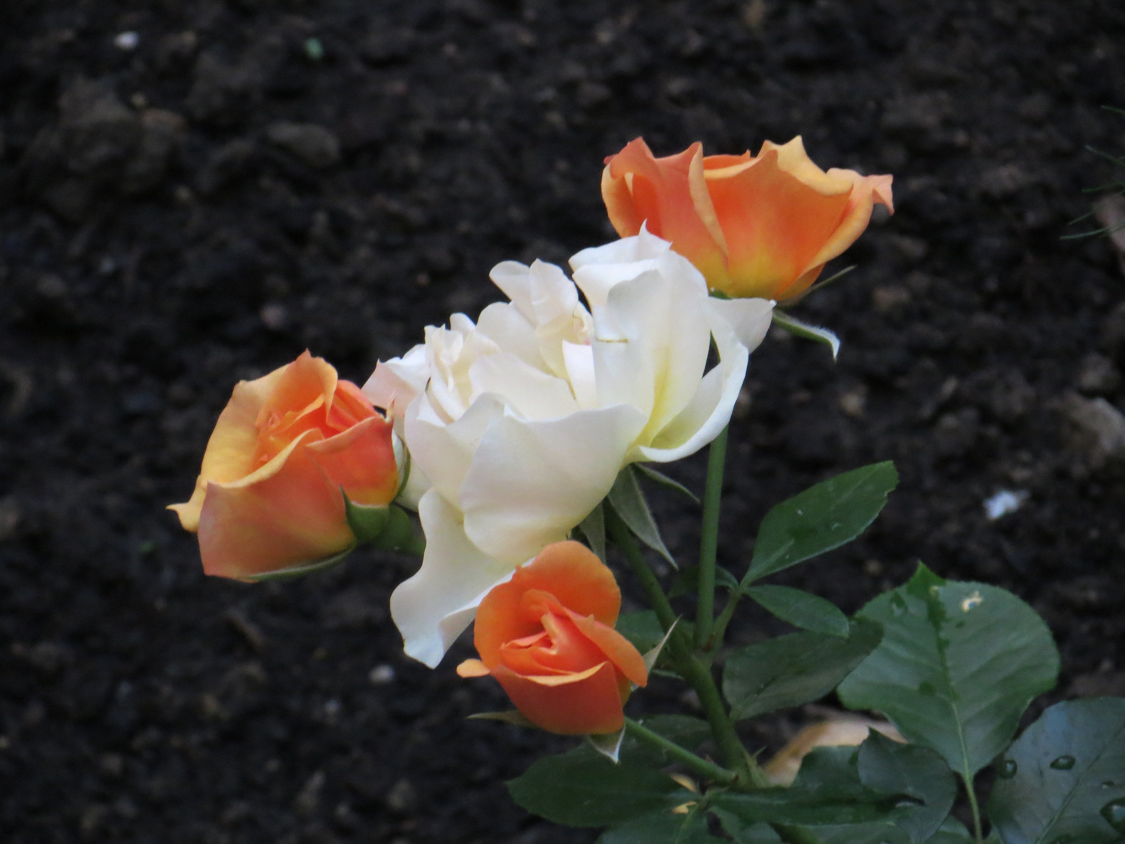 Rose